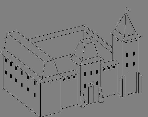 Rekonstrukcja zamku w Bytomiu - widok od południowego zachodu